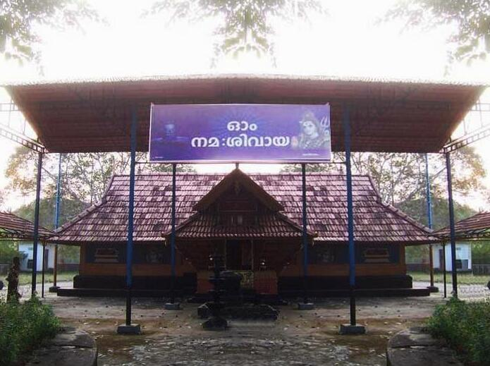 സോമേശ്വരം ക്ഷേത്രം-പാമ്പാടി-തൃശ്ശൂർ ജില്ല